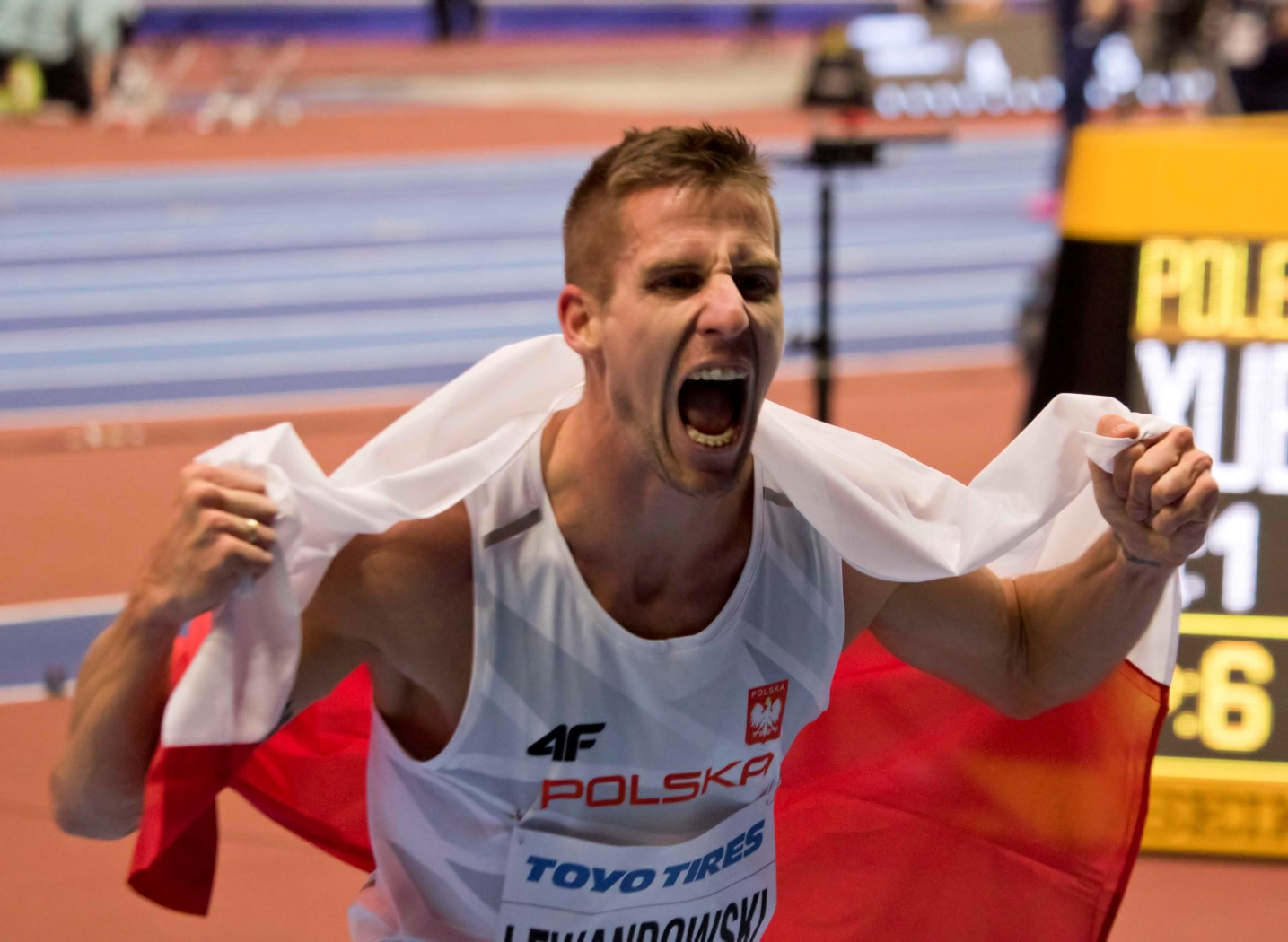 WK040165 lewandovsky